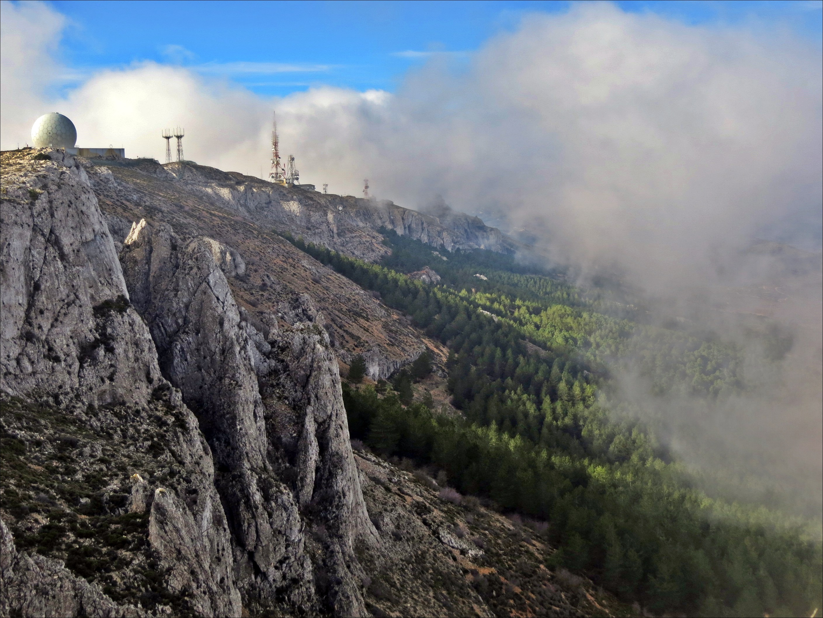 Cima de la Sierra de Aitana.